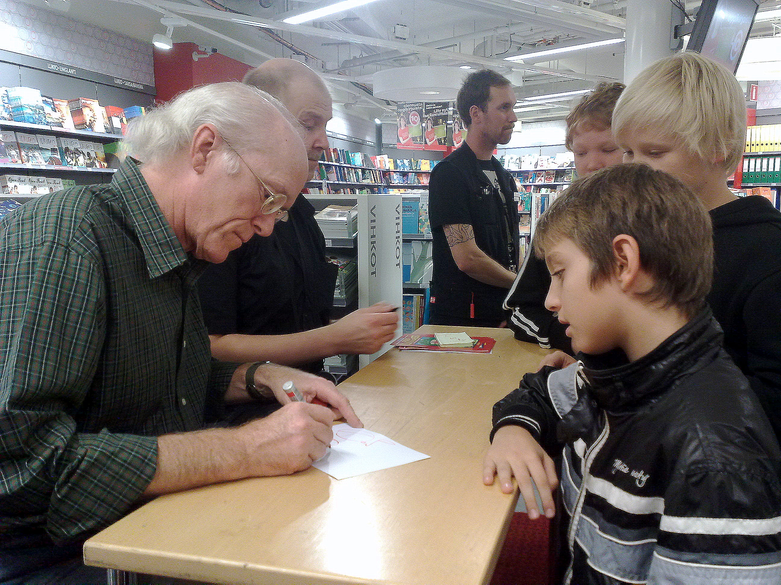 Don Rosa kirjoittaa nimikirjoituksia Helsingissä 2010